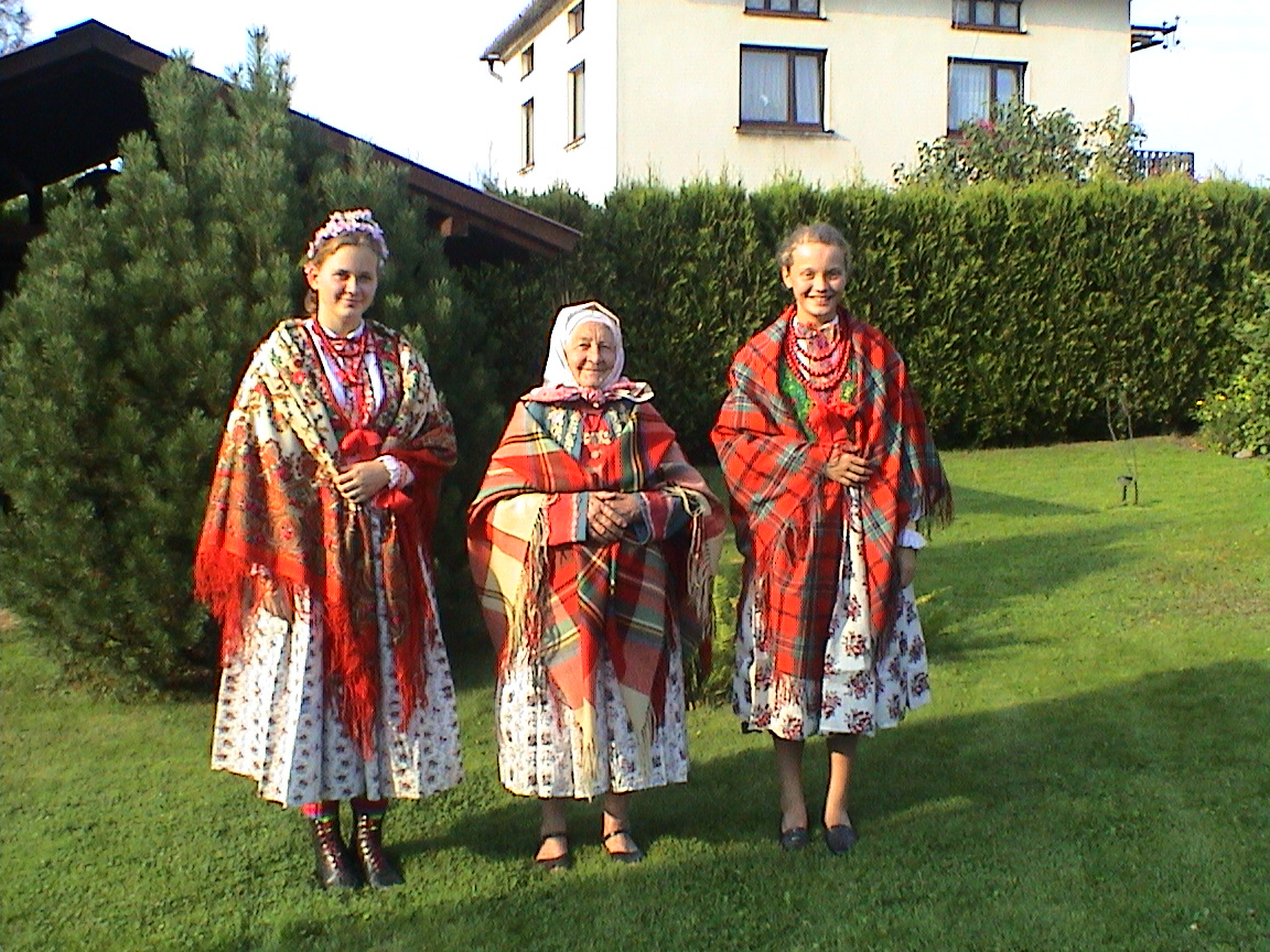 Ślůnski: Uobleczyńy normalne do fajrowańo.